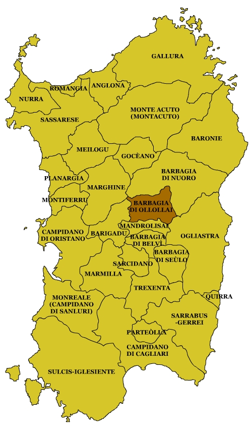 Sardinian Subregions